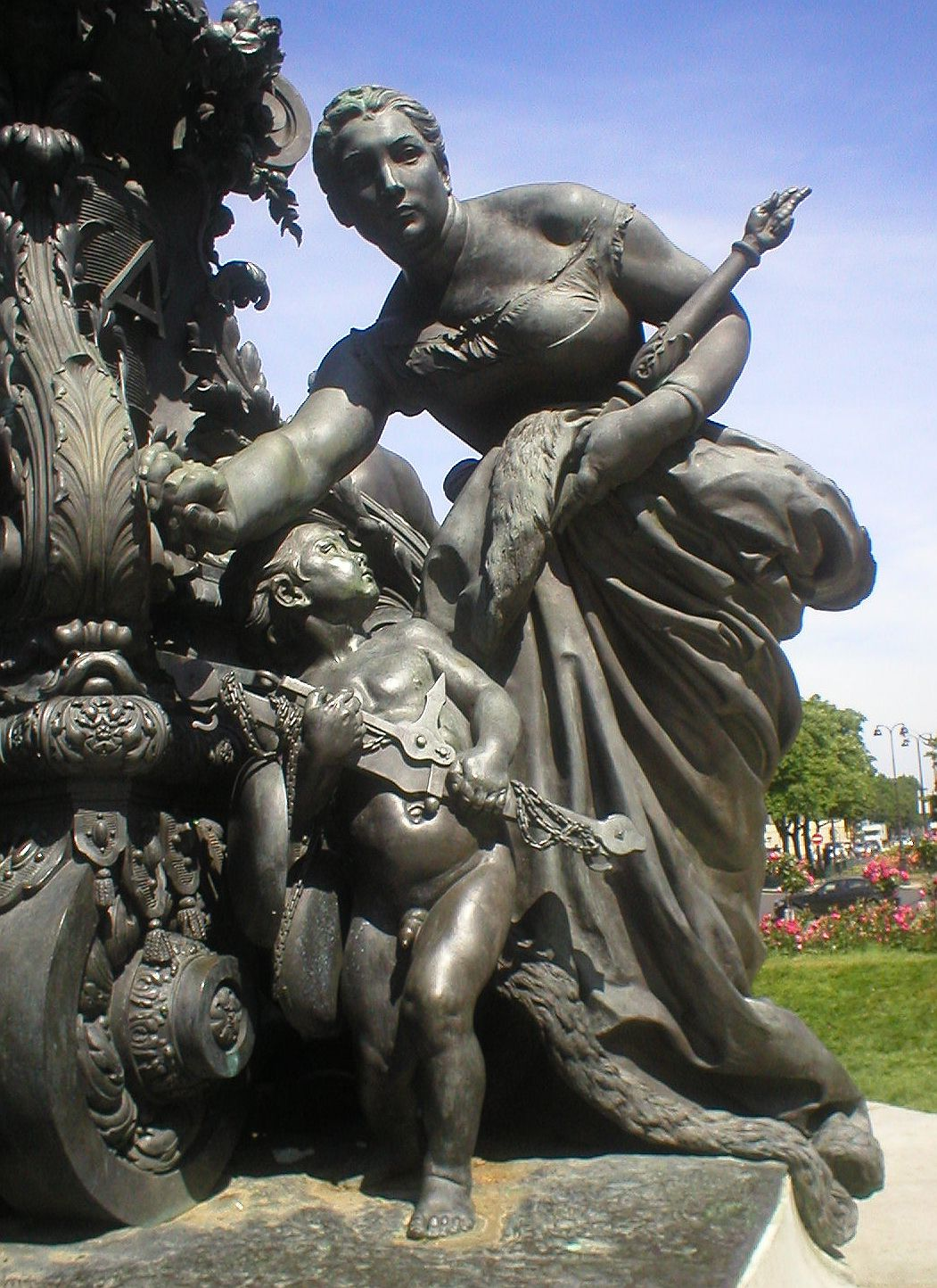 Le Triomphe de la République (1899) détail - Place de la Nation (Paris) Aimé-Jules Dalou Prise de vue personnelle (Juin 2006) Siren-Com 17:10, 9 June 2006 (UTC)